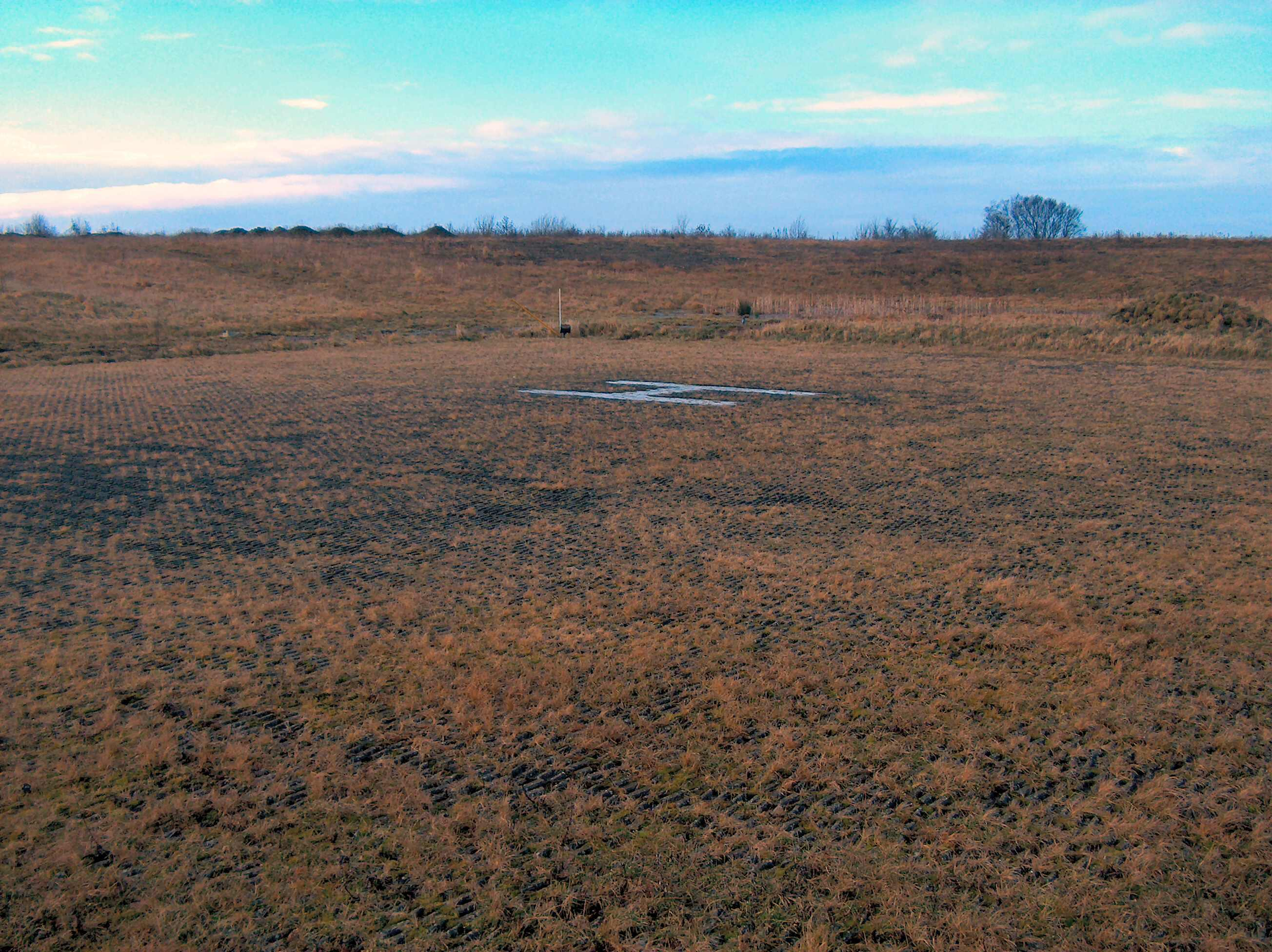 Helipad ved Skejby Sygehus, Århus